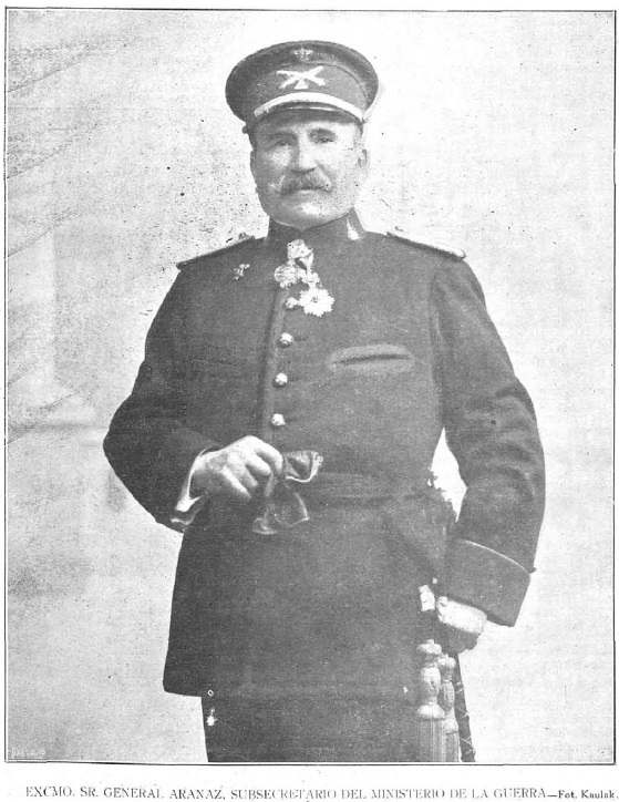 Retrato del general Aranaz, obra del fotógrafo Kaulak, recogido en la revista española La Ilustración Española y Americana.